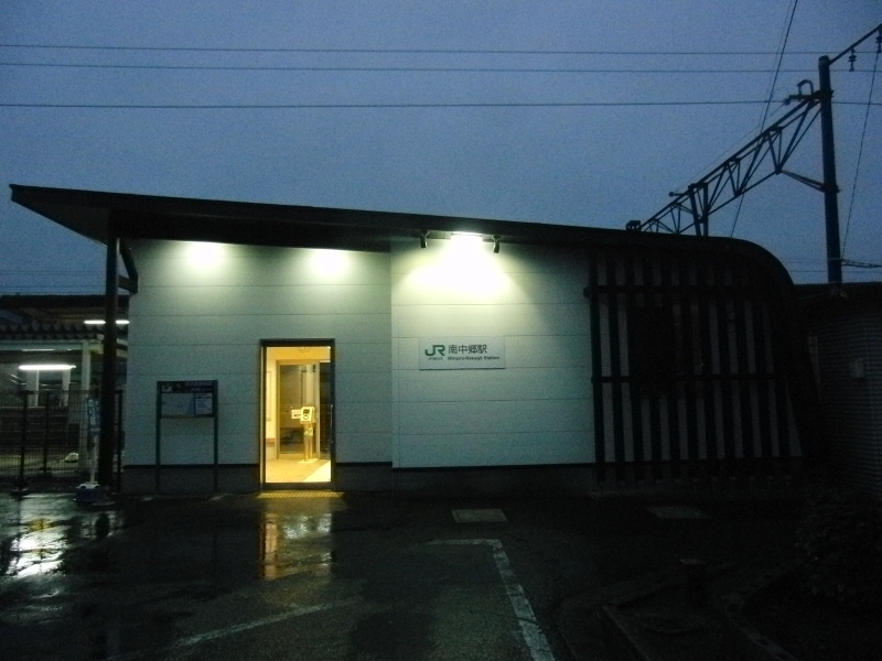 JR東日本の常磐線の南中郷駅の駅舎の写真です。